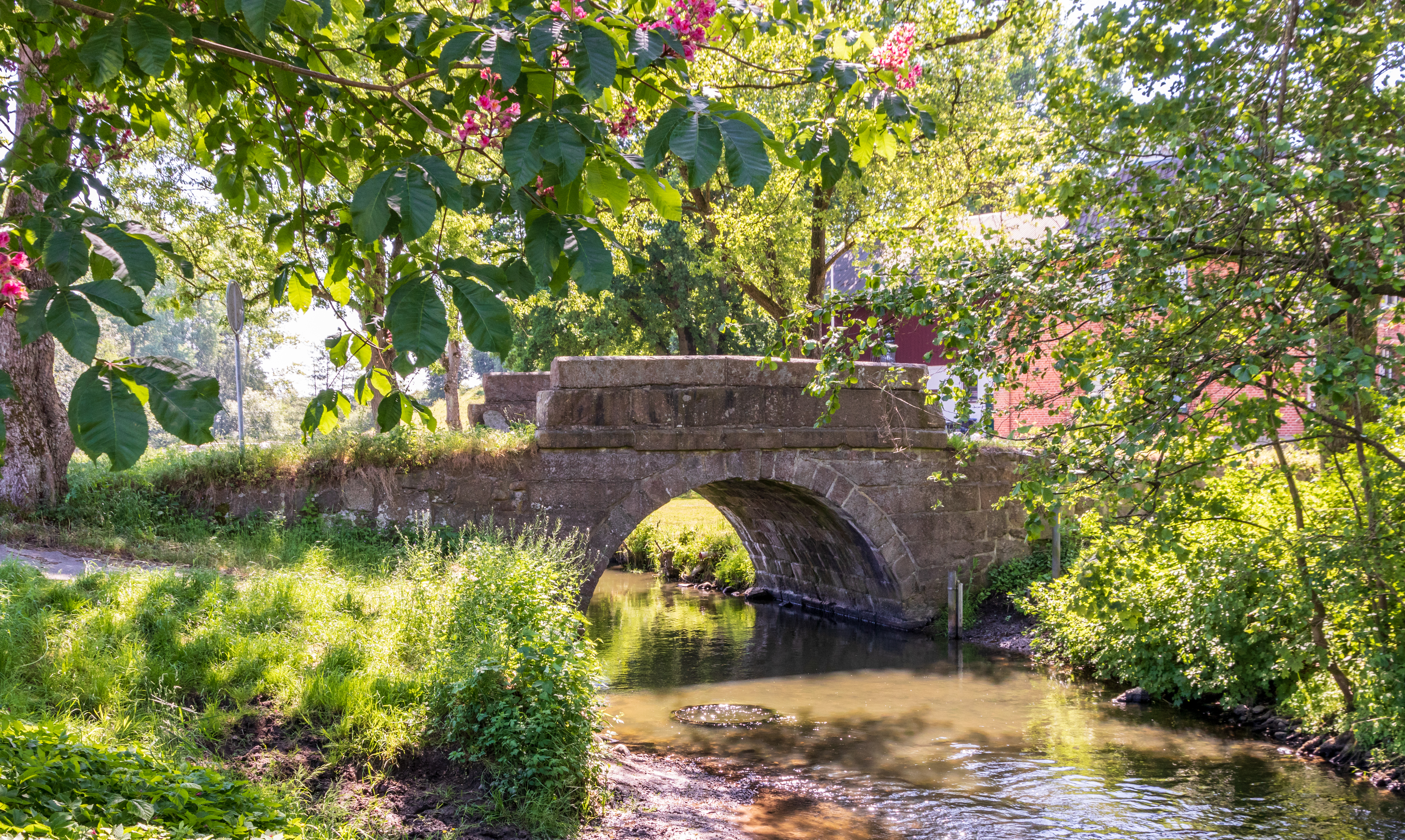 Die Steinbrücke über die Eider von 1803 in Reesdorf.